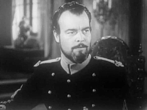 John Merton dans Zorro et ses légionnaires (1939).